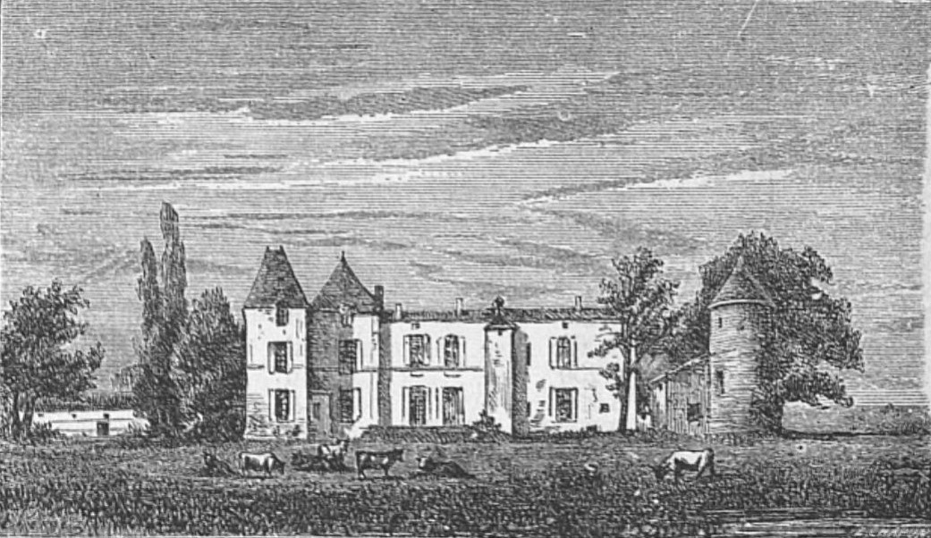 Illustration du Château d'Yquem dans l'ouvrage Bordeaux et ses vins (6ème édition) de Charles Cocks et Edouard Féret publié en 1893